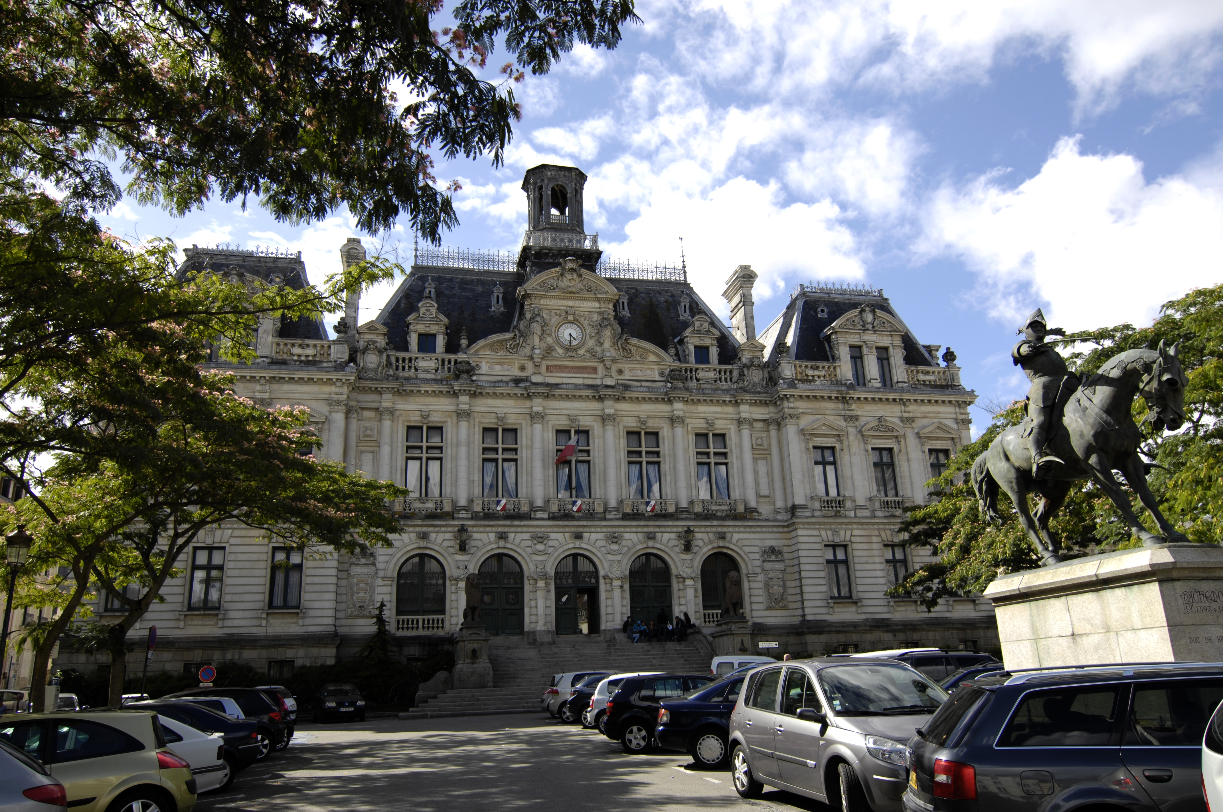 Vannes, Morbihan, Bretagne, Rathaus